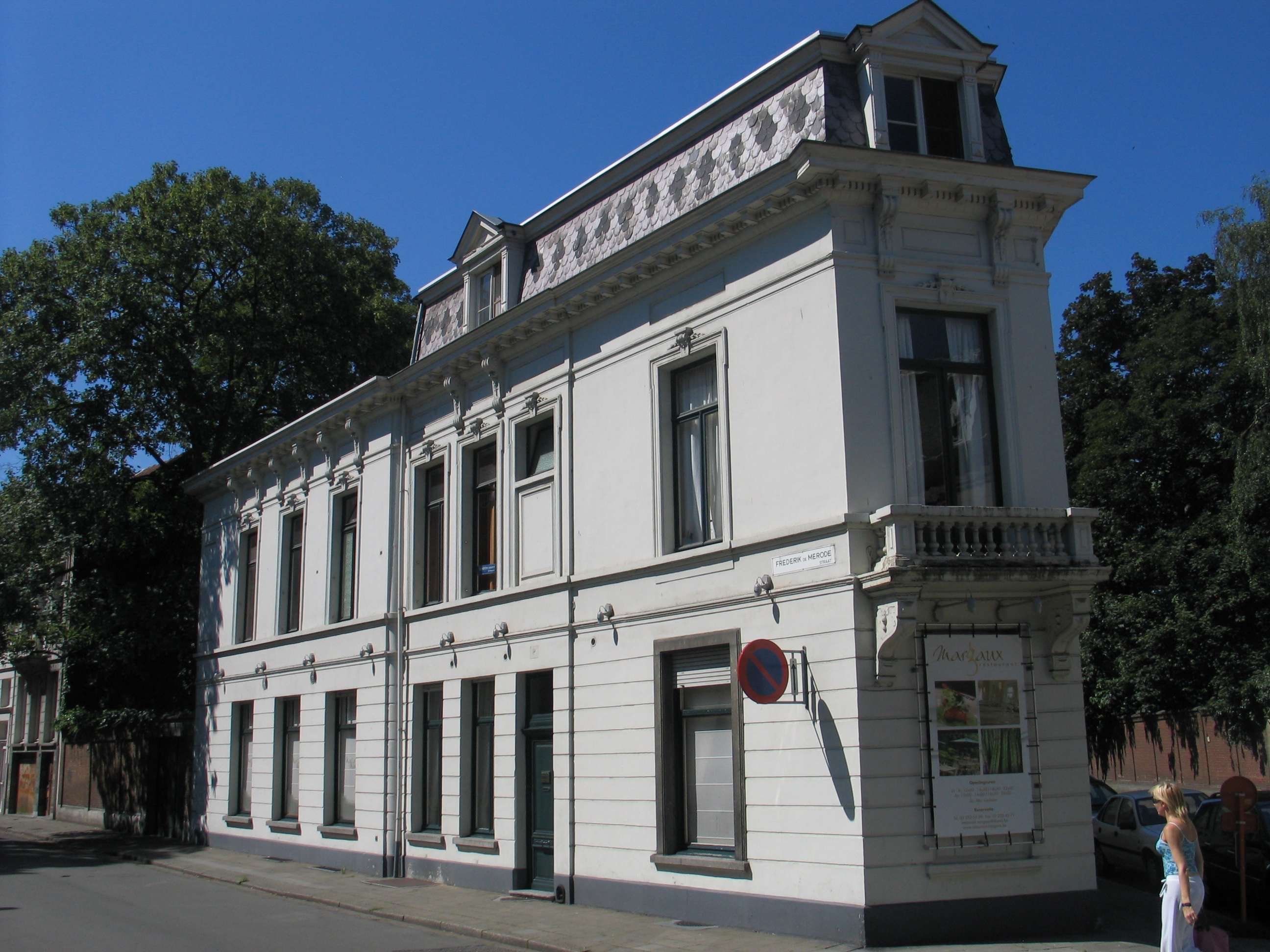 Antwerpen, district Berchem, België. Neoclassicistisch hoekhuis De Merodestraat / Terlinckstraat. Ontwerp van Ch. De Roeck uit 1888.